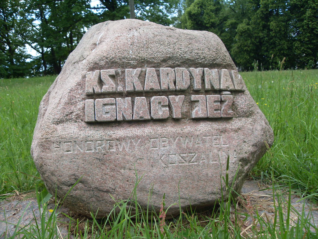 Pomnik-głaz w Alei Dębów Pamięci w parku im. Tadeusza Kościuszki w Koszalinie poświęcony ks. kardynałowi Ignacemu Jeżu.